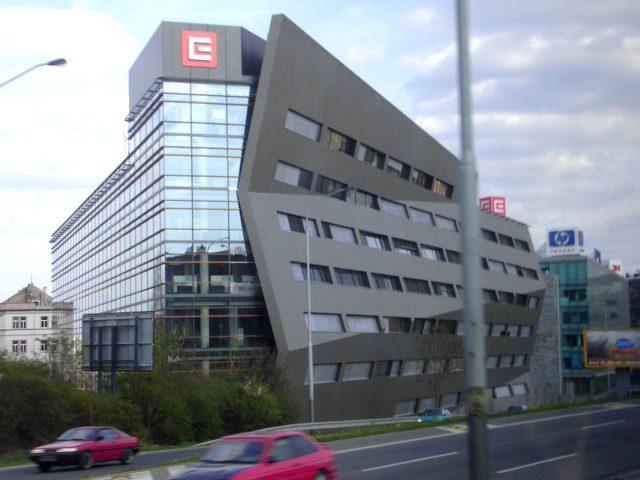 Praha-Michle, BB Centrum, budova E, U pomníku/Duhová čp. 425, pohled z ul. 5. května.